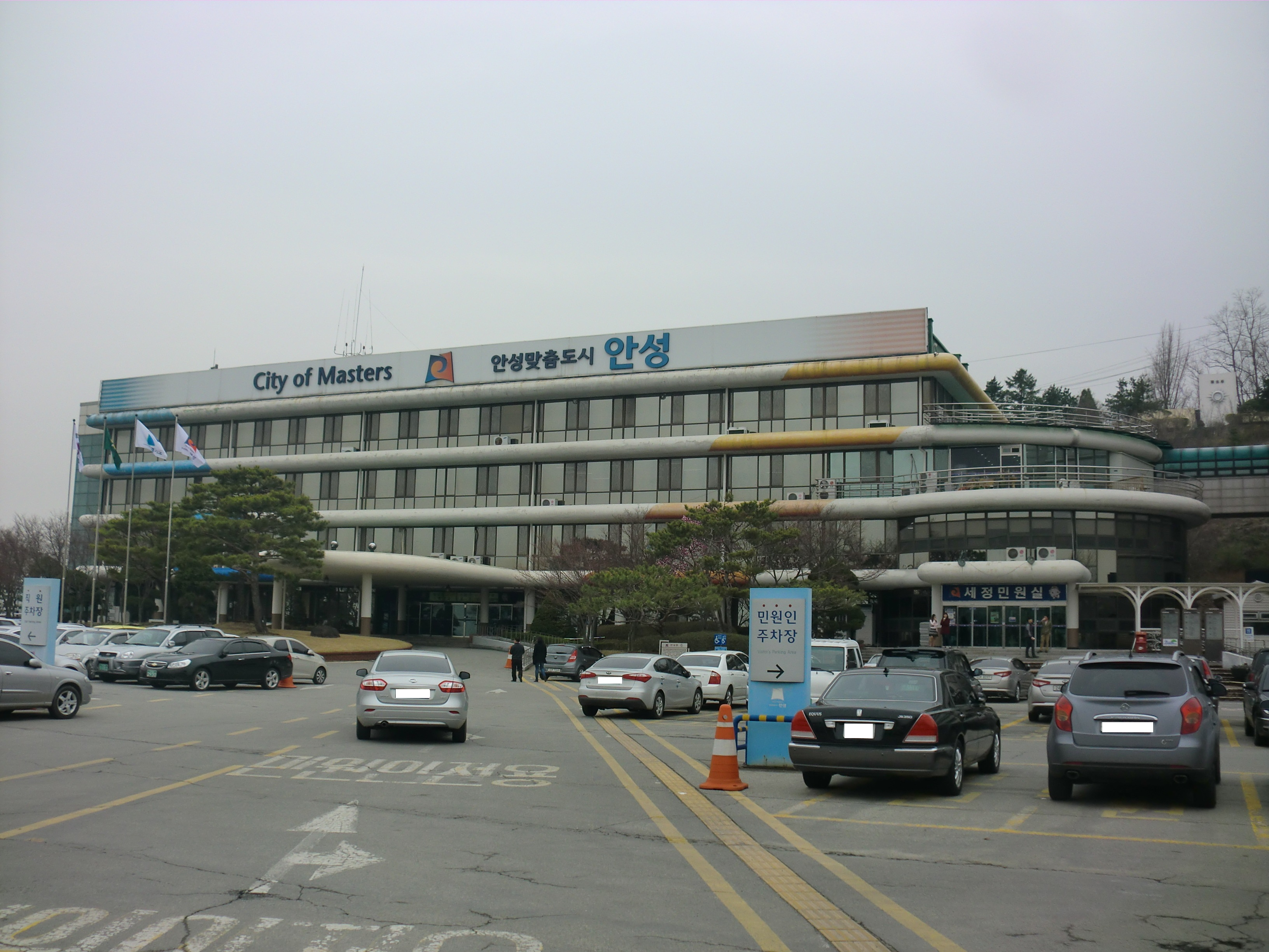 경기도 안성시에 있는 안성시청